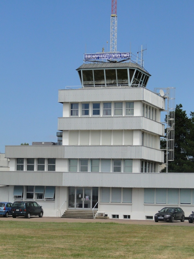 Tour de controle